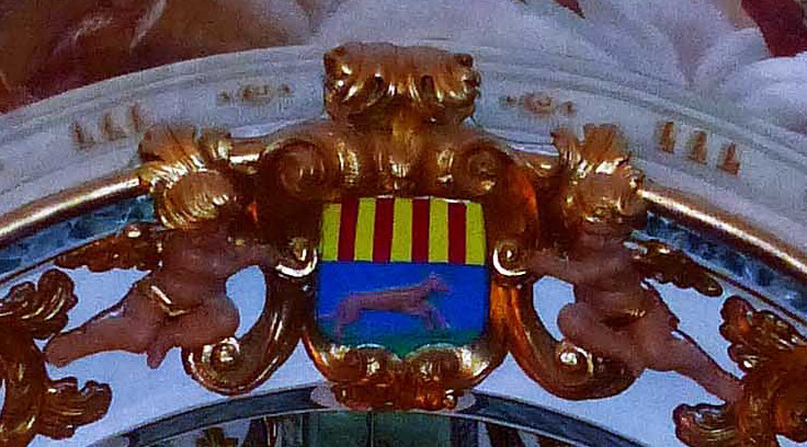 Detall de l'escut de Catí a l'interior de l'Ermita de la Mare de Déu de l'Avellà.